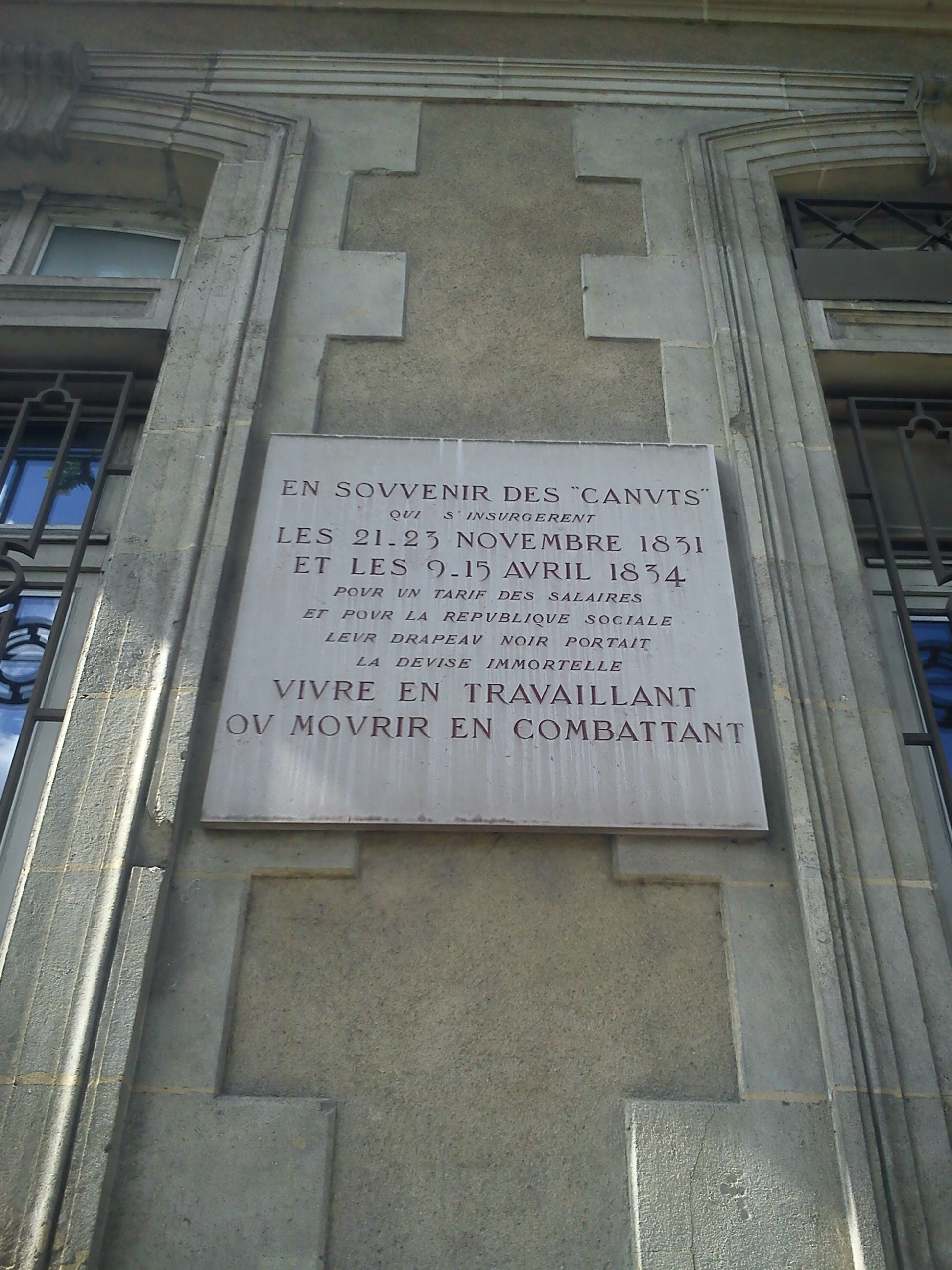 EN SOUVENIR DES "CANUTS" qui s'insurgèrent LES 21-23 NOVEMBRE 1831 ET LES 9-15 AVRIL 1834 pour un tarif des salaires et pour la république sociale leur drapeau noir portait la devise immortelle VIVRE EN TRAVAILLANT OU MOURIR EN COMBATTANT